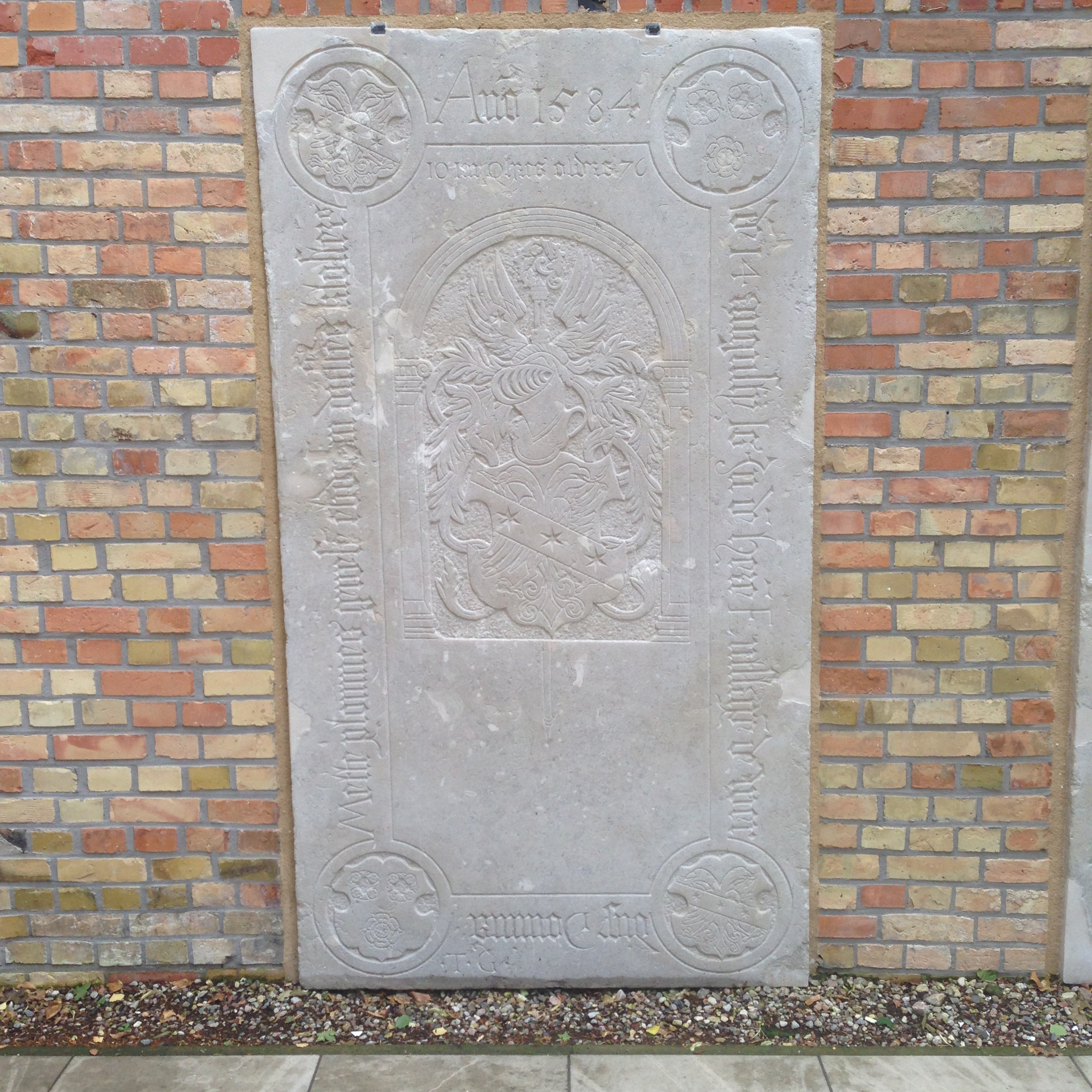 Grabplatte Grabanlage Bothmer auf dem Friedhof von Klütz. Grabplatte der Äbtissin Mathilde Ploennies (+ 1584 August 14) des Lübecker Johannisklosters mit den Wappen Plönnies und Greverade nach der Restaurierung. Seit dem frühen 19. Jahrhundert in Klütz. (KLSO3)